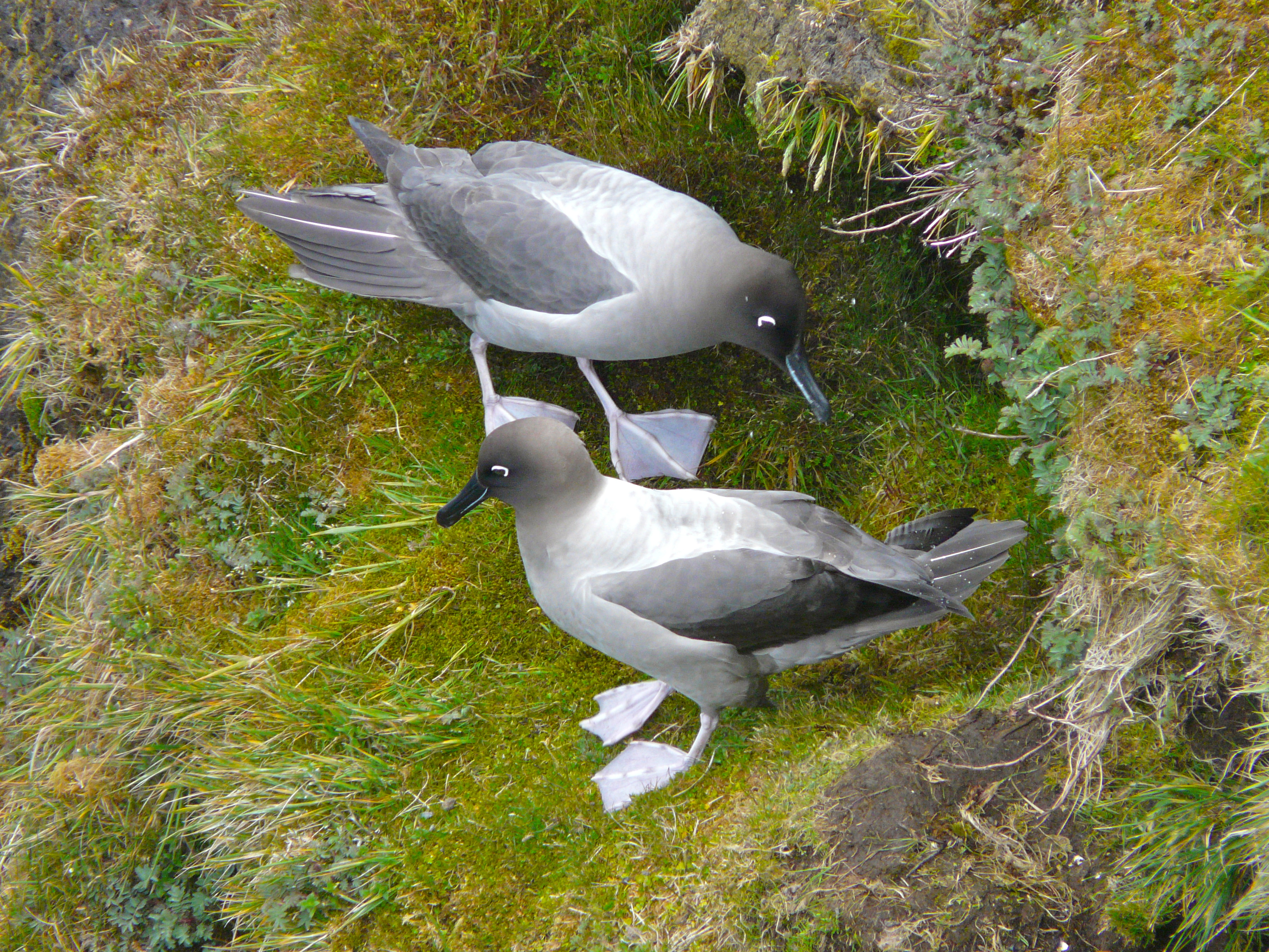 couple d'albatros fuligineux